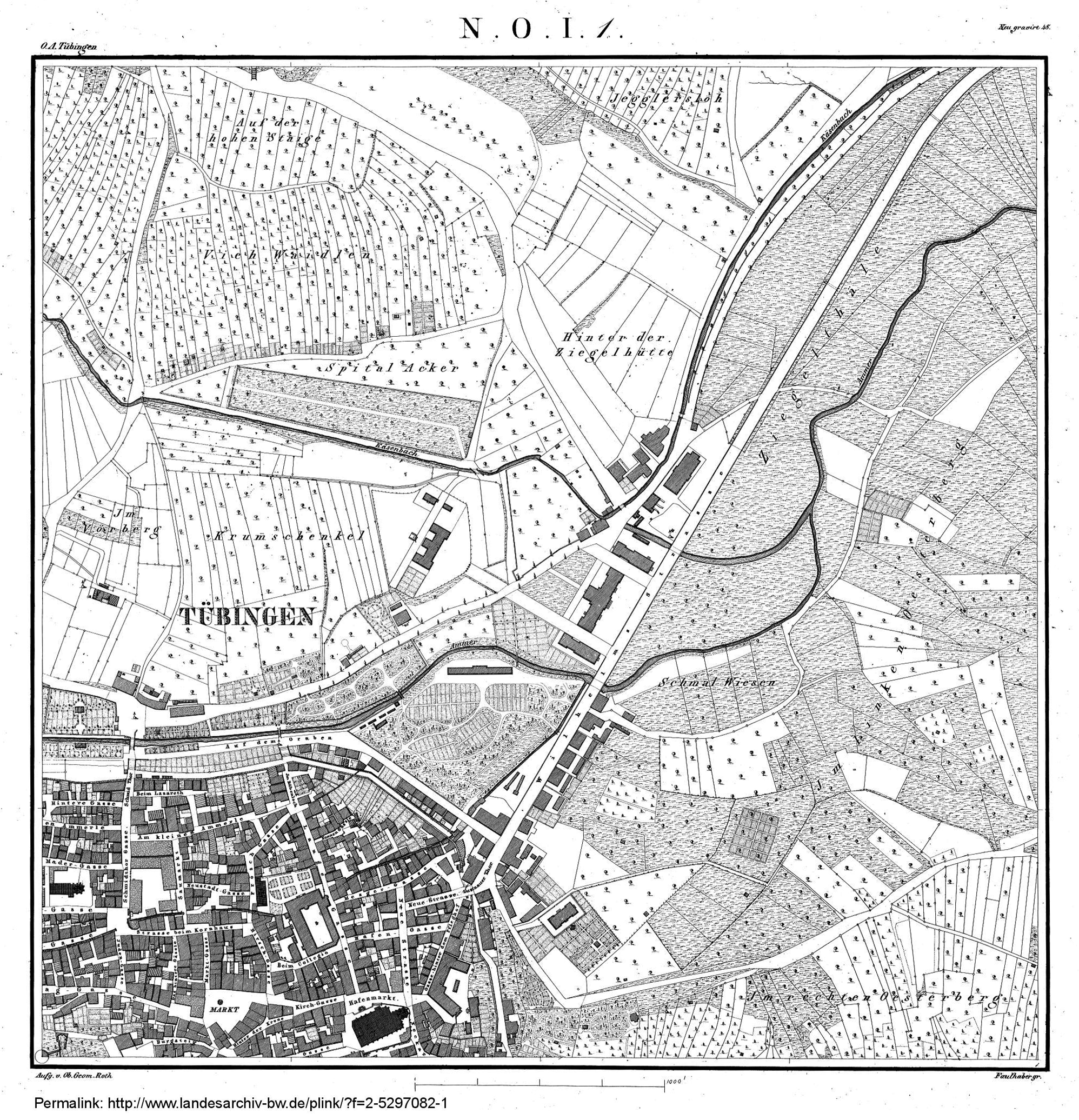 Flurkarte 1:2.500 von Tübingen. Quadrant NO, Schicht I, Blatt 1. In der Ecke links unten ist der Fundamentalpunkt der Landesvermessung markiert